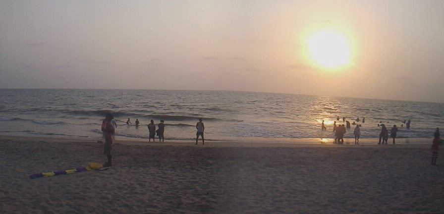 ചെറായി കടപ്പുറം